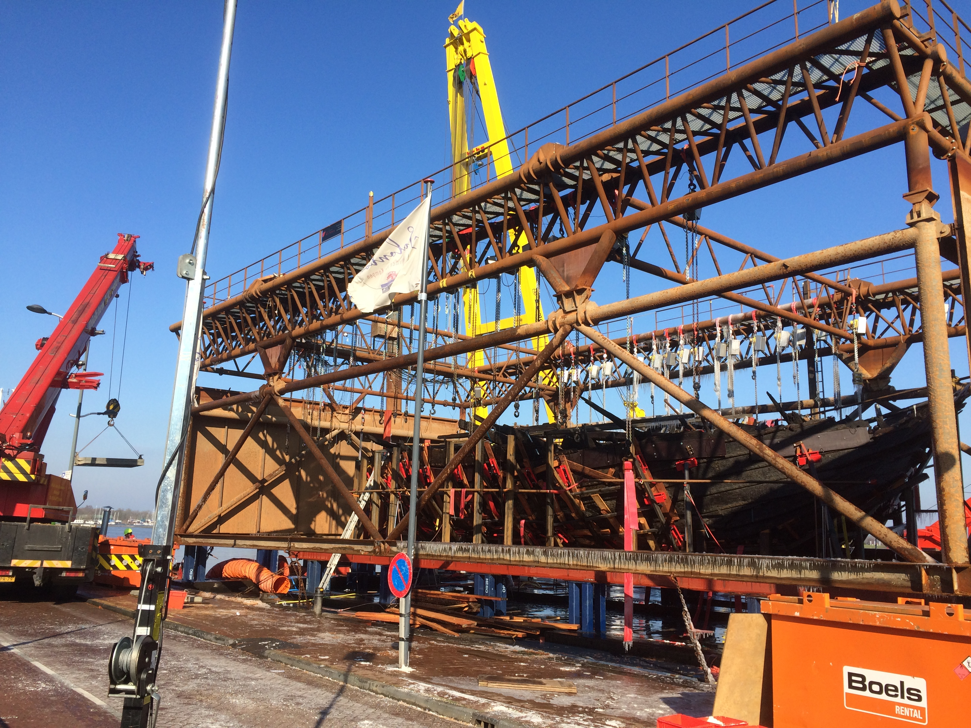 Lichten IJsselkogge - kade in Kampen